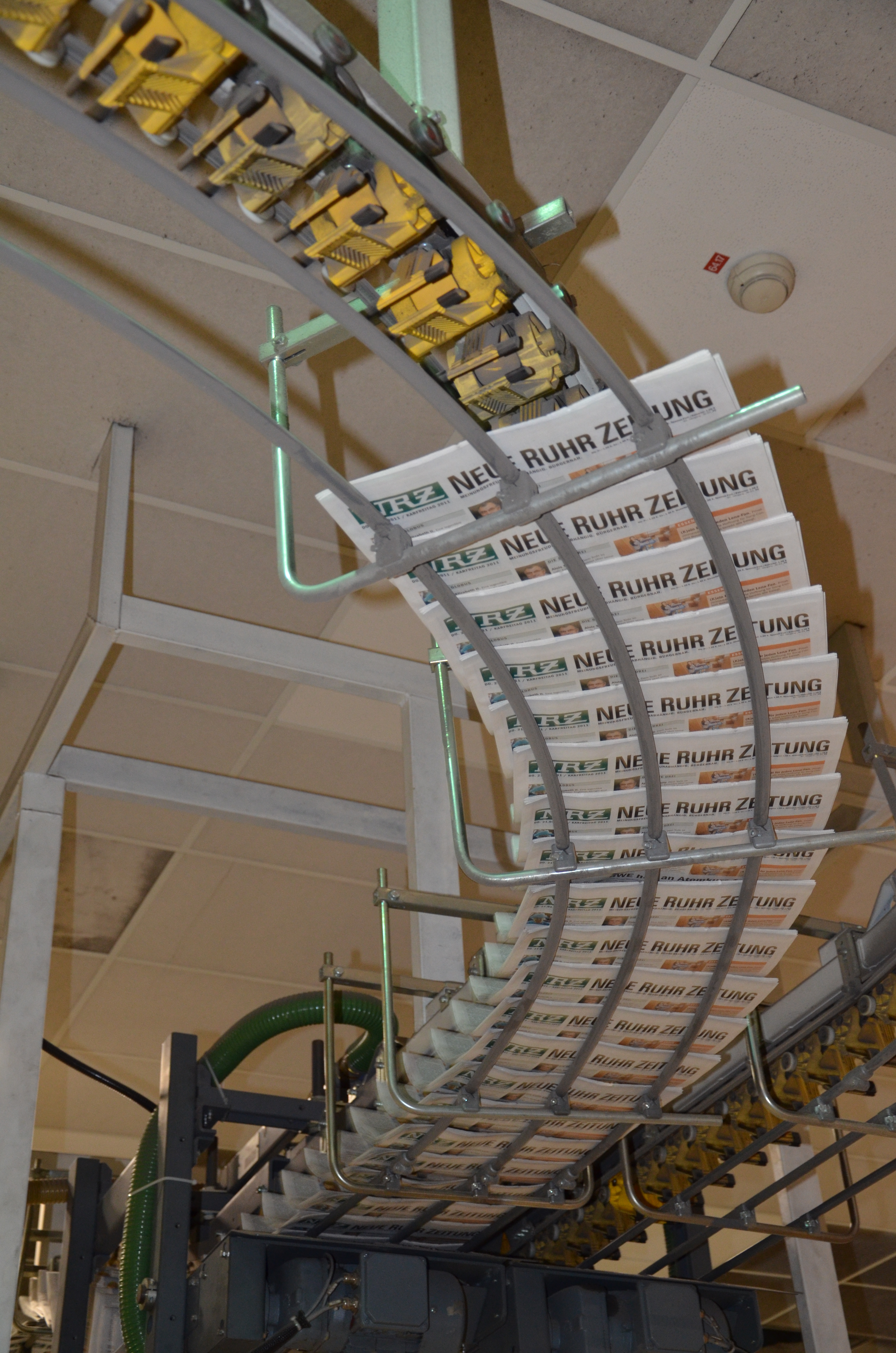 Druckhaus der WAZ Mediengruppe in Essen: NRZ vom nächsten Tag im Laufband.